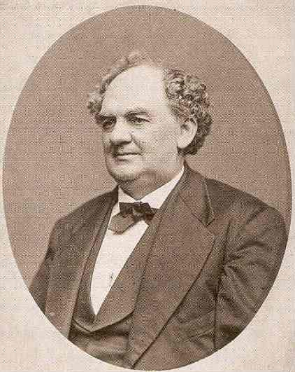 Phineas Taylor Barnum (1810-1891)